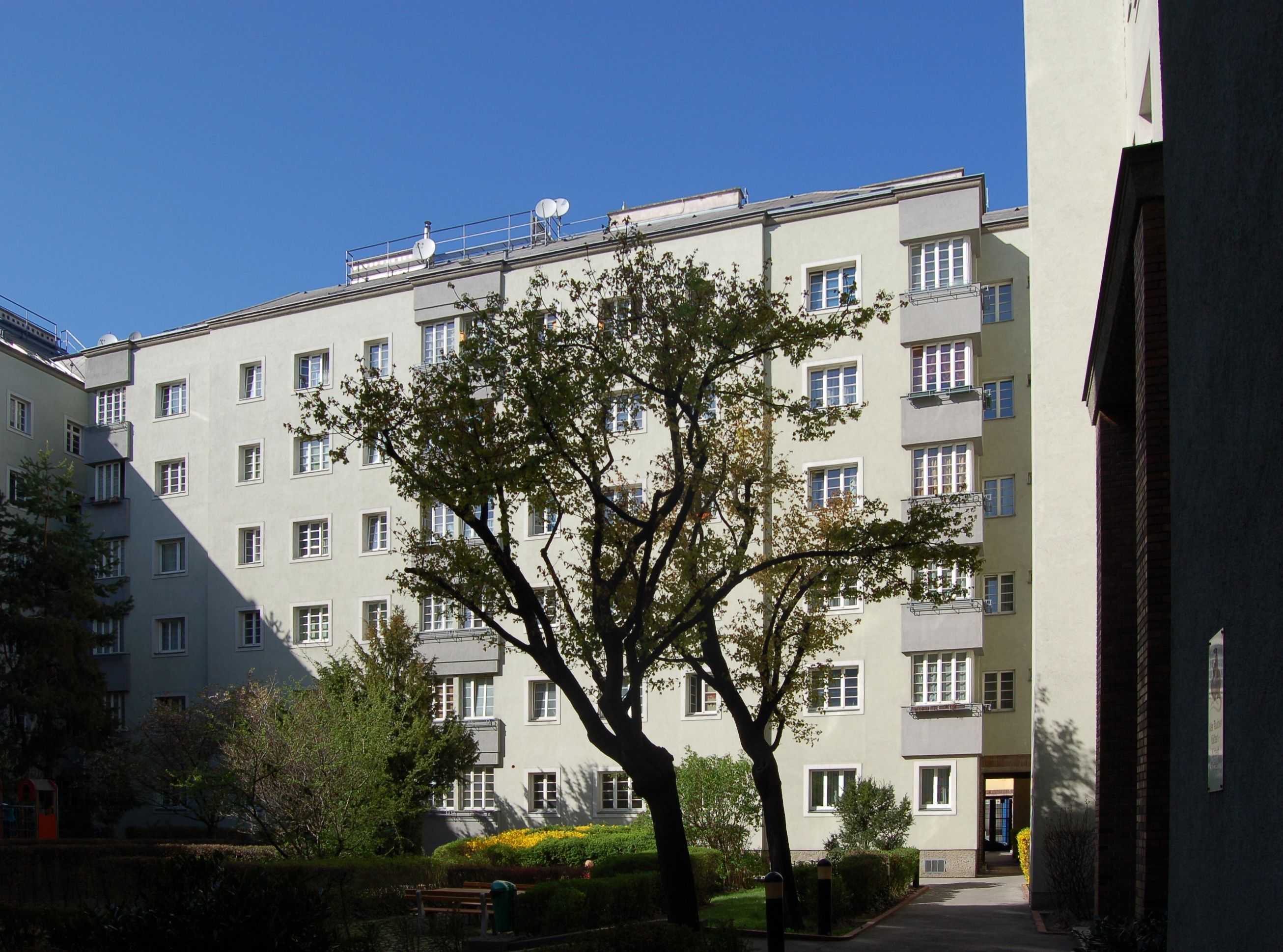 Karl-Volkert-Hof in Wien-Ottakring (Thaliastraße 75). Blick in den Innenhof.